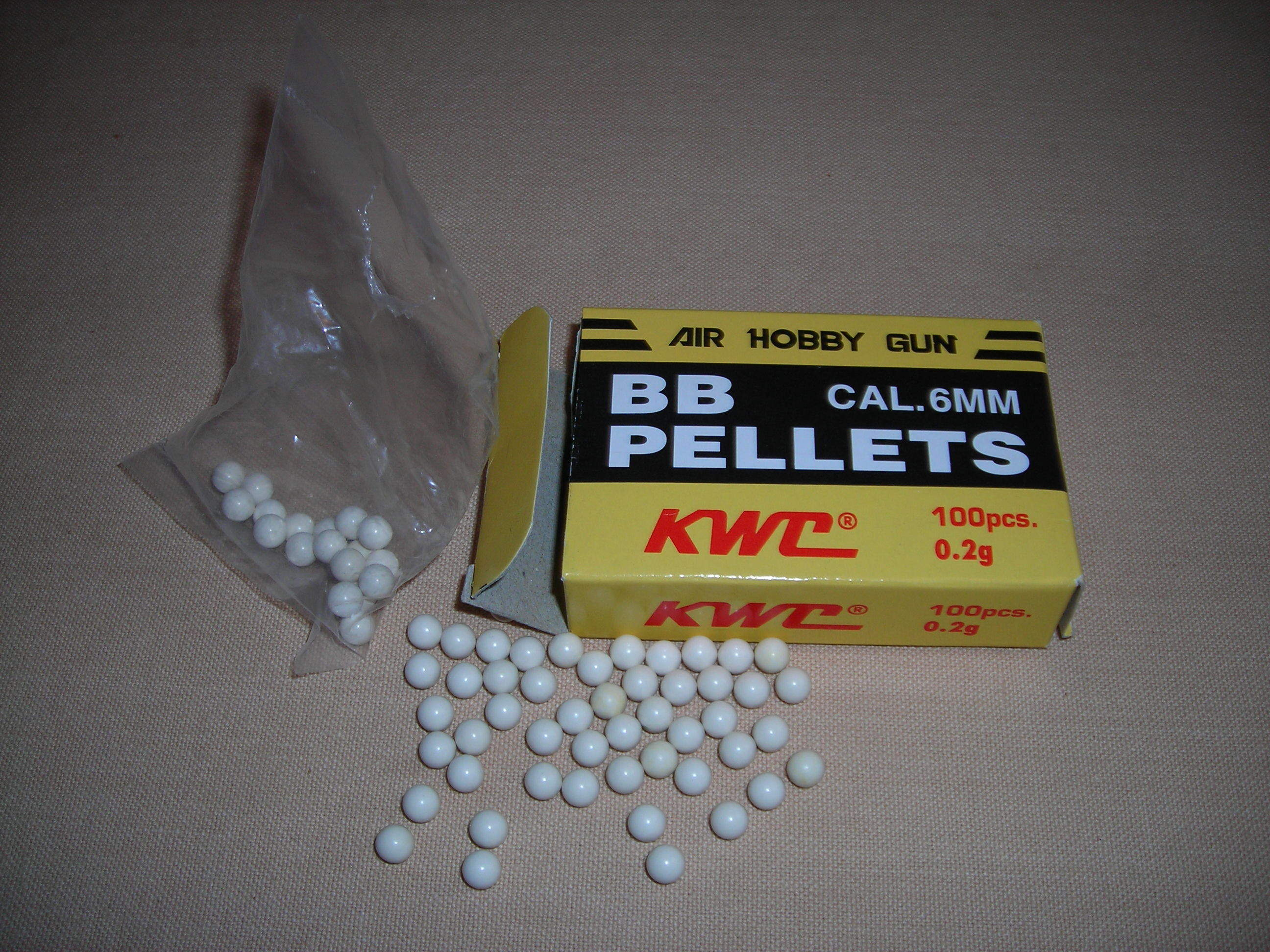 Description Kogeltjes voor gebruik in een BB-gunDate 12/01/2007Source Zelfgemaakte fotoAuthor Erik1980 Kogeltjes voor gebruik in een BB-gun